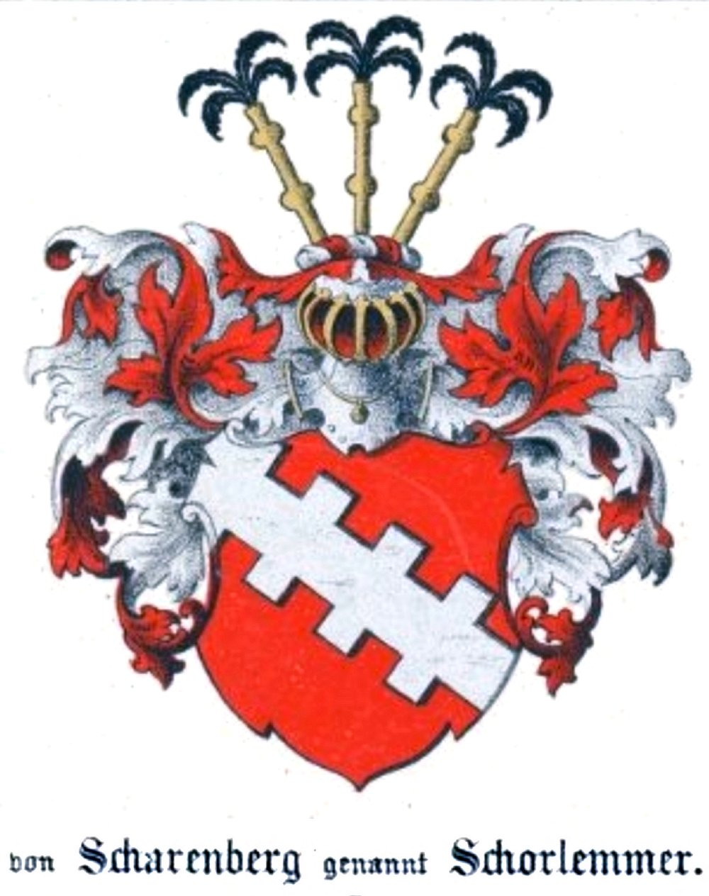 Scharenberg gen. Schorlemmeri suguvõsa aadlivapp